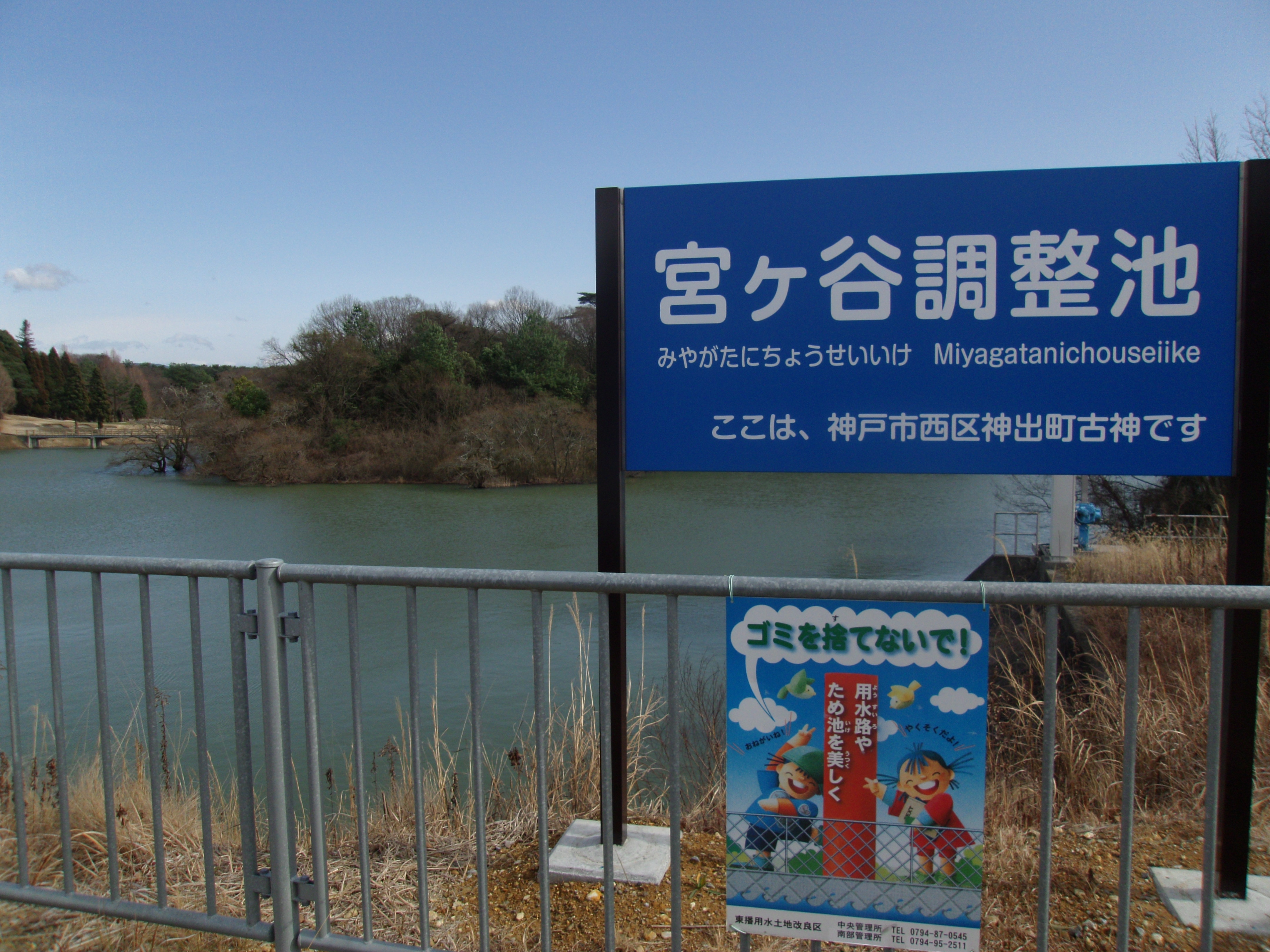 淡河疎水と山田川疎水が合流する宮ヶ谷調整池（大堤池）